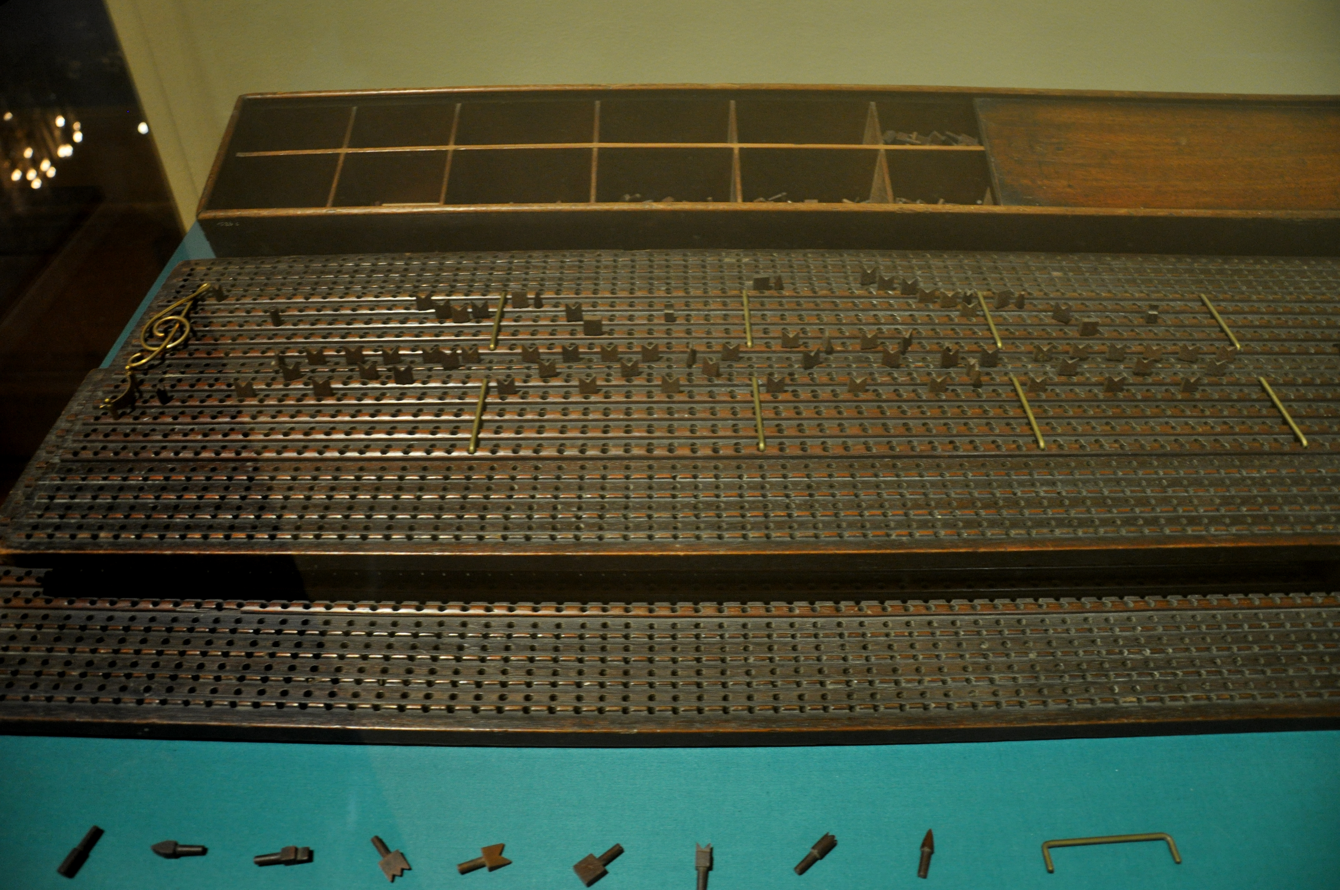 Kompositionstafeln der blinden Pianistin und Komponistin Maria Theresia von Paradis (Johann Riedinger zugeschrieben, Wien, Anfang 19. Jh.) Wien, Kunsthistorisches Museum, Sammlung alter Musikinstrumente (Neue Burg), Inv. Nr. SAM 1026